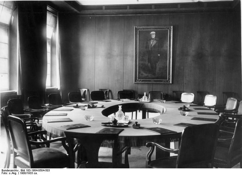 Neubau, Alte Reichskanzlei: Sitzungssaal des Kabinetts [Berlin]